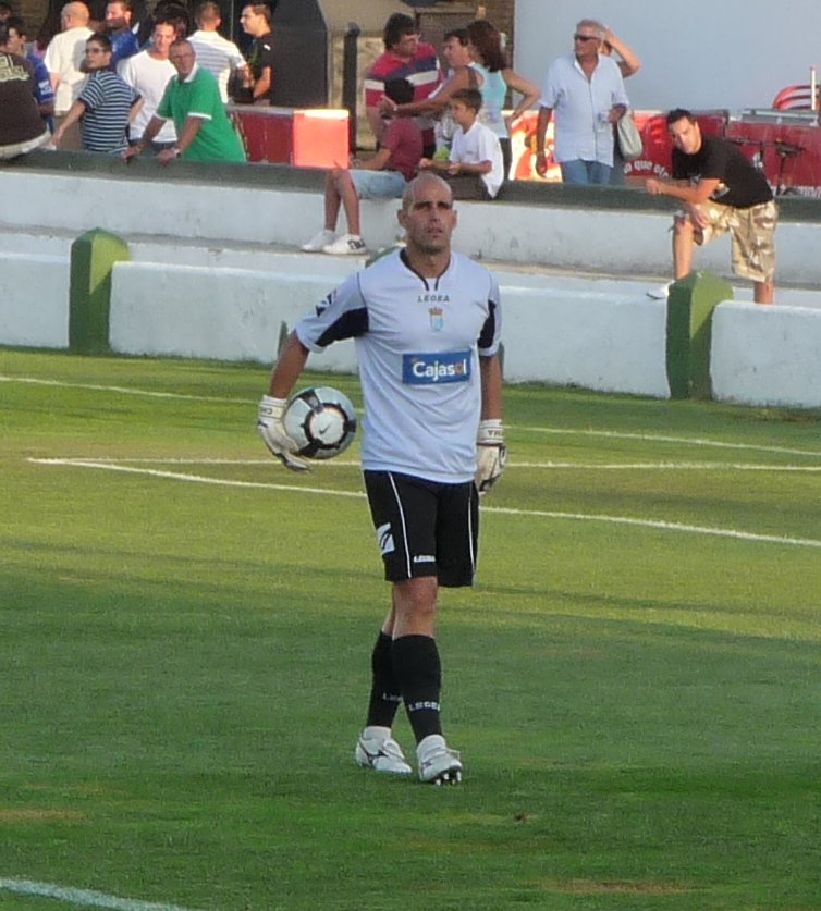 Chema-XerezCD-p1040350.jpg